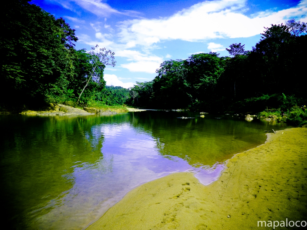 Rio Bambana.